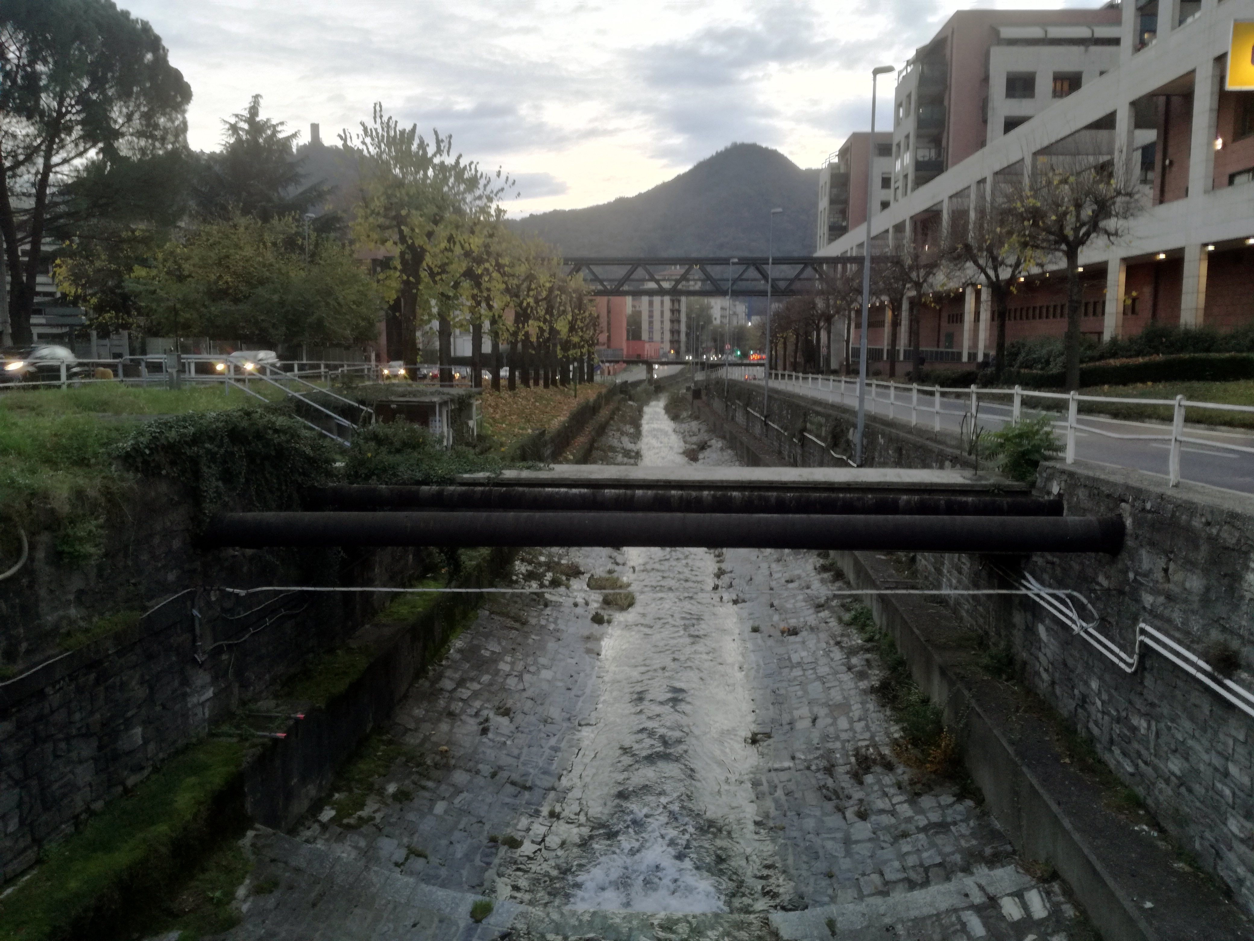 Como, un canale che divide le due carreggiate della SS342